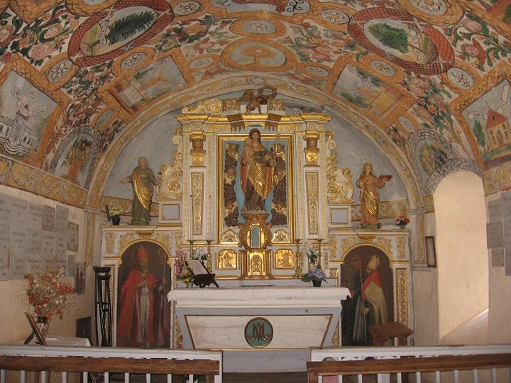 La Chapelle Notre-Dame de Consolation à Thiézac, Cantal, France. . Composition baroque naïve.